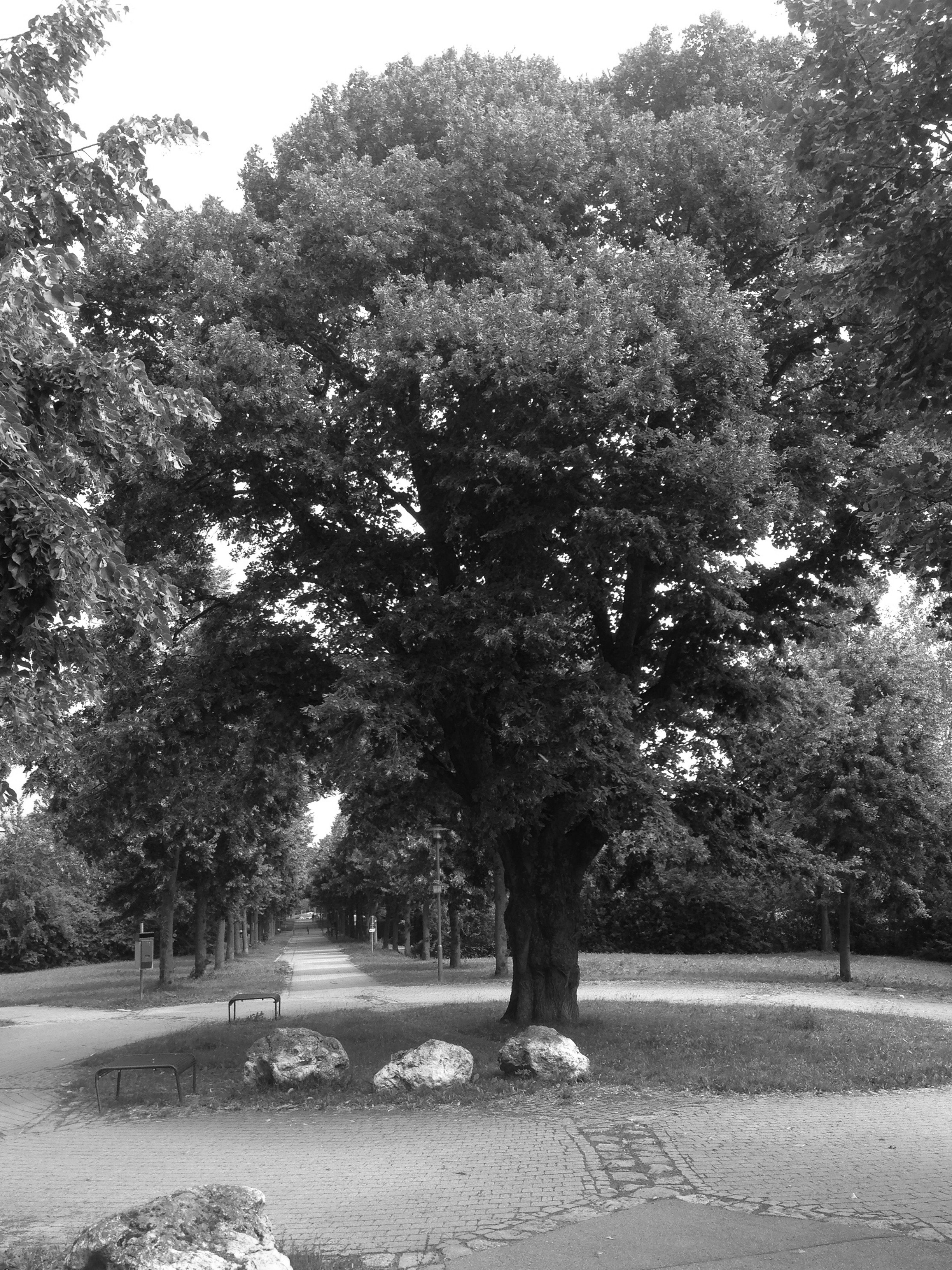 Linde nahe der Möricke-Straße in Neuprüll, eingetragen in der Liste der Naturdenkmäler der Stadt Regensburg